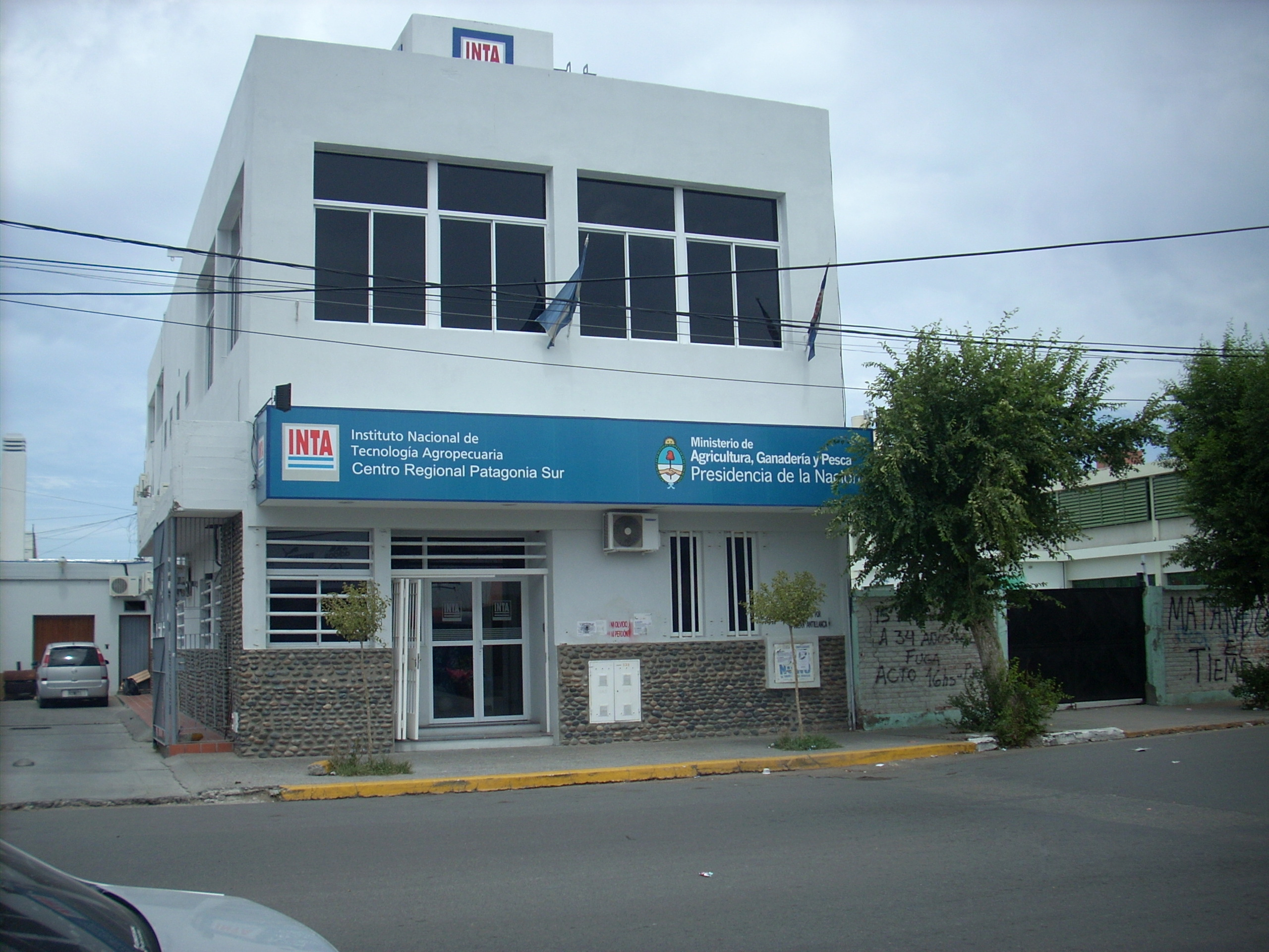 Oficinas del Instituno Nacional de Tecnología Agropecuaria en Trelew